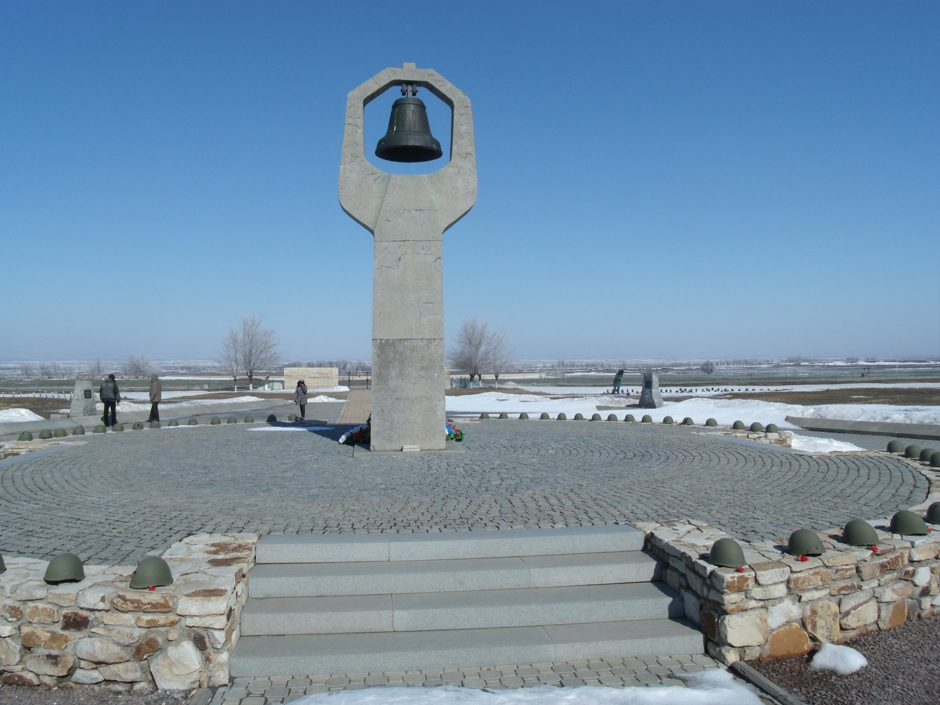 Russischer Teil der Gedenkstätte Rossoschka